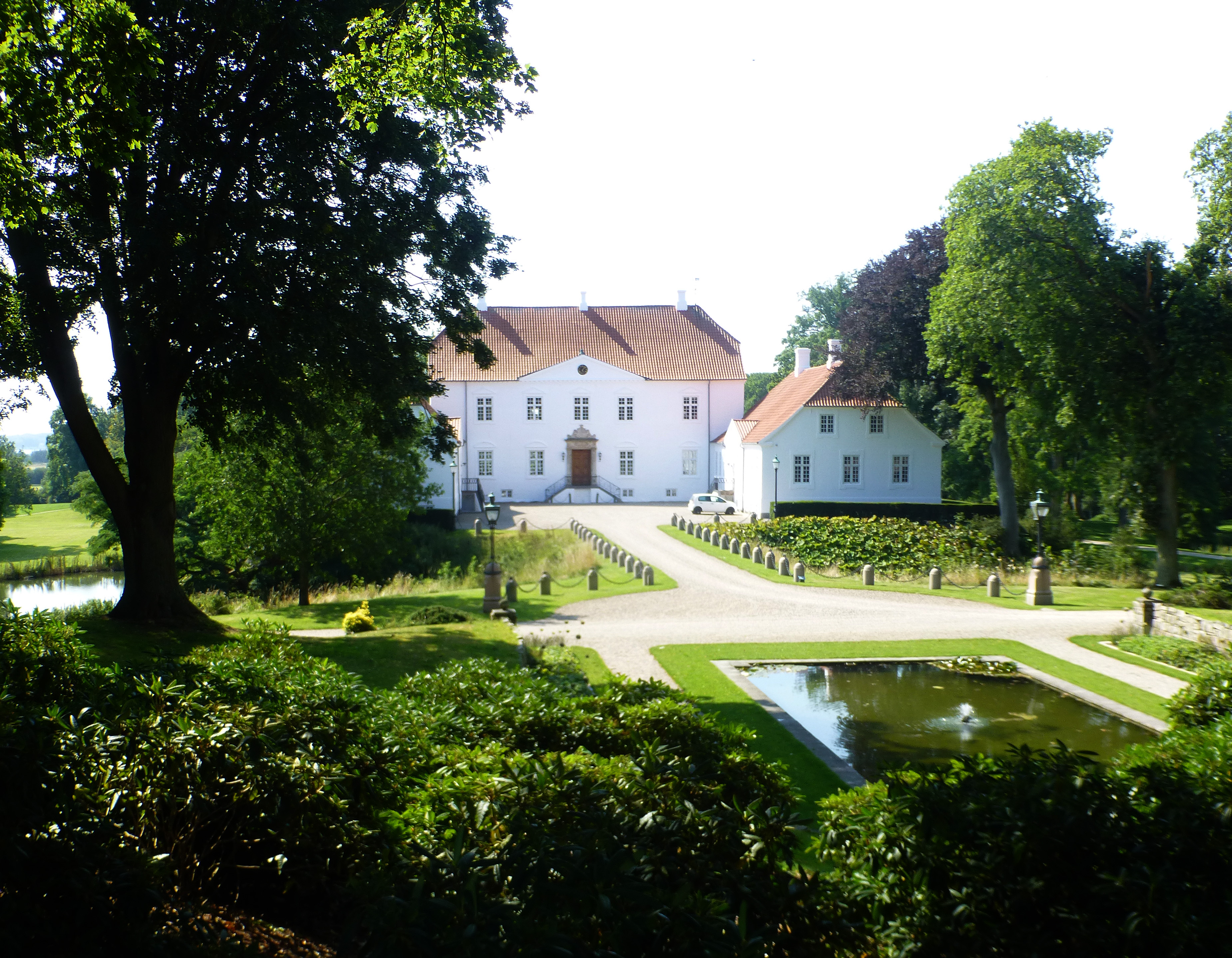 Herregården Palsgård